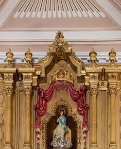 Imagen de la Purísima Concepción que preside el retablo Mayor de la Parroquia de igual nombre